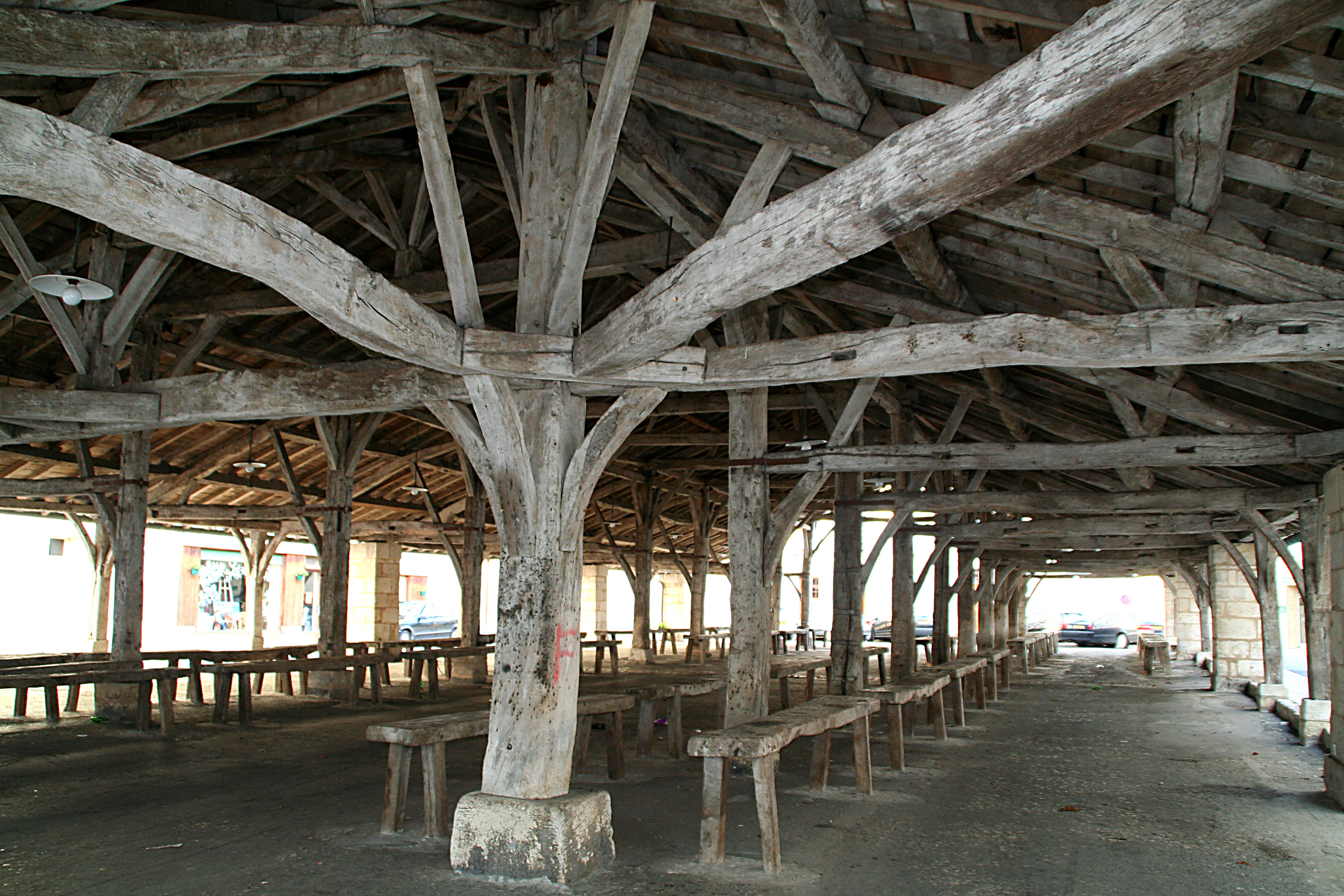 Halles de Cozes (Inscrit) .